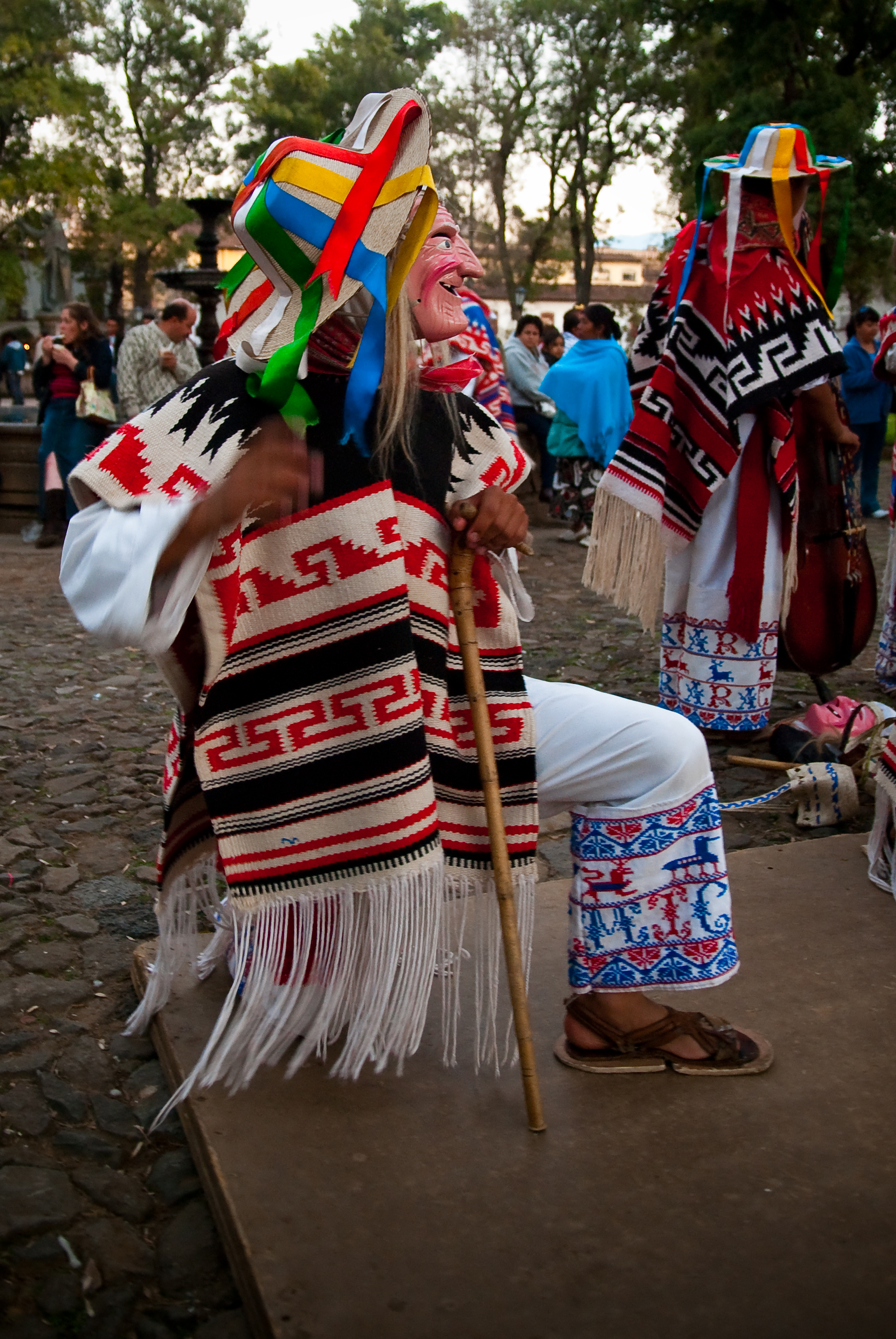 Me tocó bailarla en el kinder para un día de las madres. Creo que todavía conservo mi bastón (me lo hizo mi jefe a partir de una rama seca... está re-chido). En fín: La "Danza de los viejitos" es, probáblemente, la más popular del Estado de Michoacán. Su origen es Purépecha y es típica de Pátzcuaro o Uruapan.